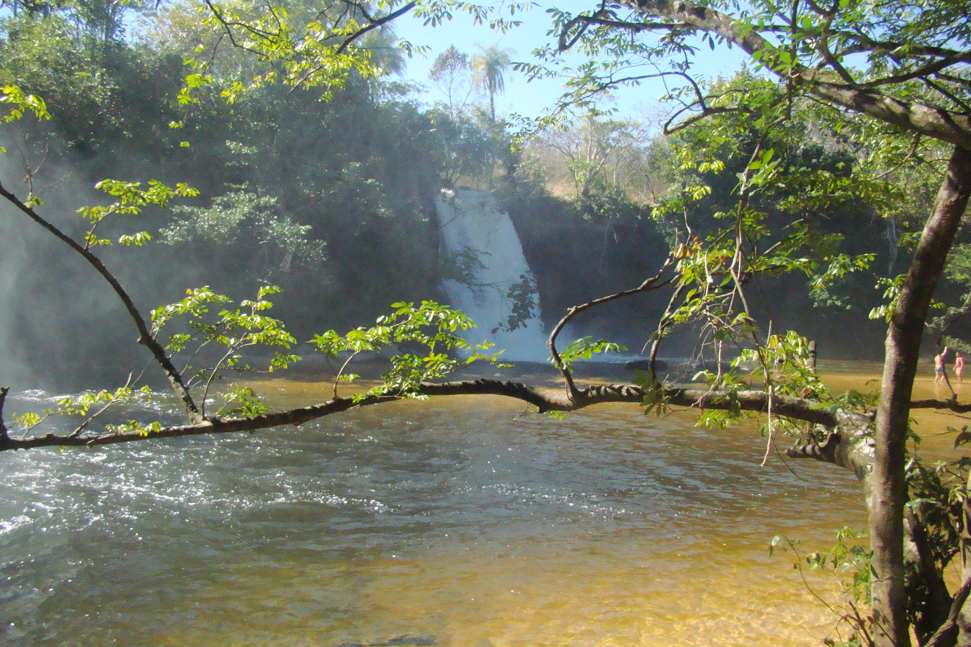 Cachoeira de Itapecuruzinho, no município de Carolina-MA.